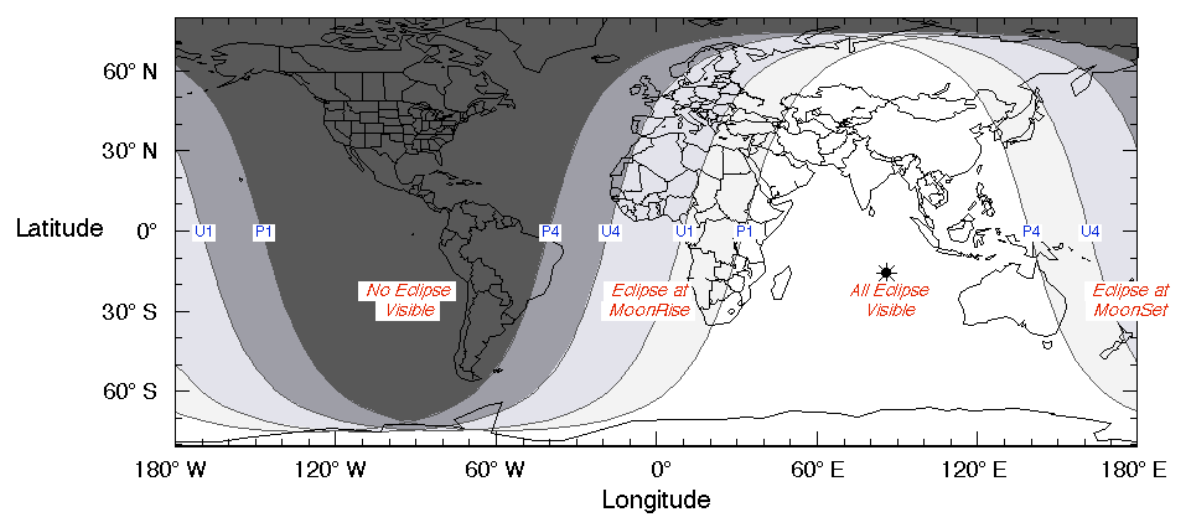 Visibilidad eclipse agosto 7 de 2017